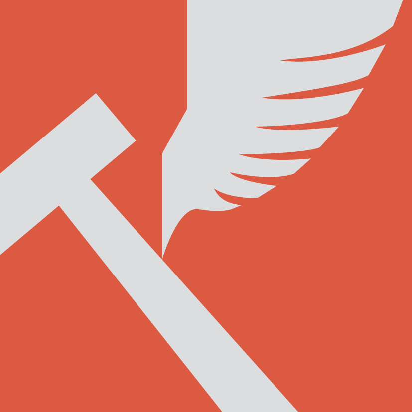 Logo Zabytkowej Kopalni Srebra w Tarnowskich Górach (od 2017)